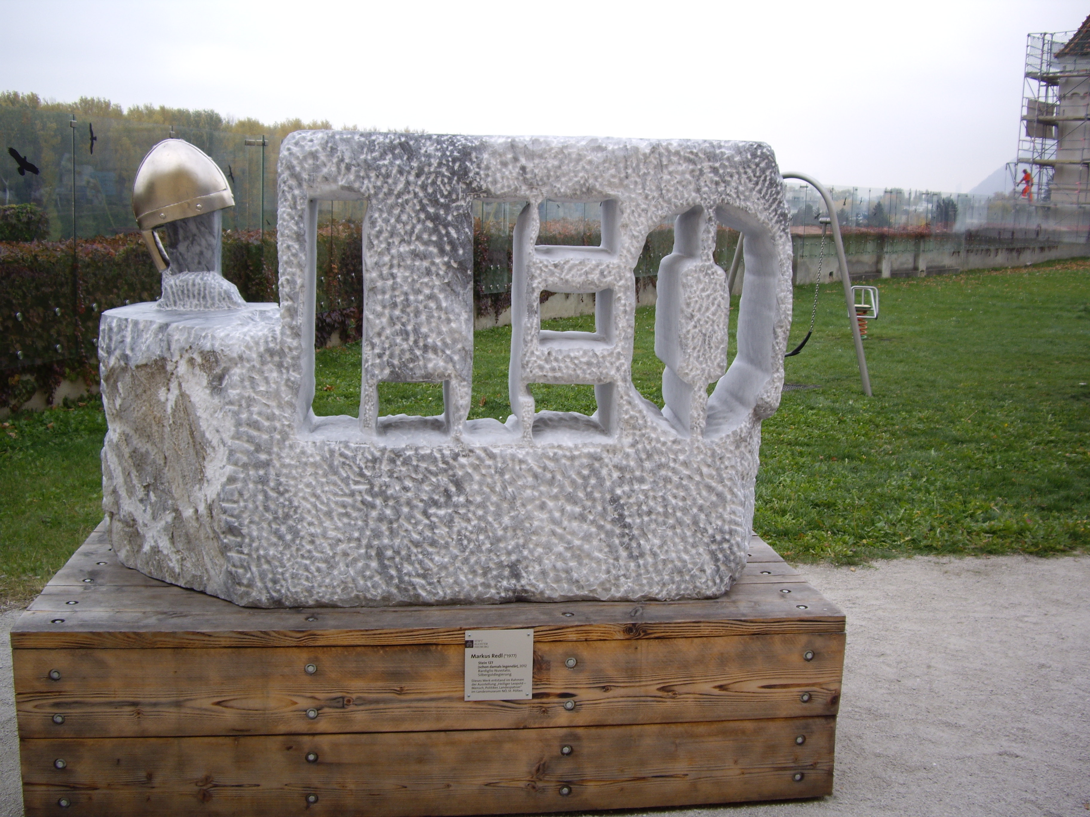 „LEO“ estas ĉizita el unu bloko de carrara-mamoro de Markus Redl.